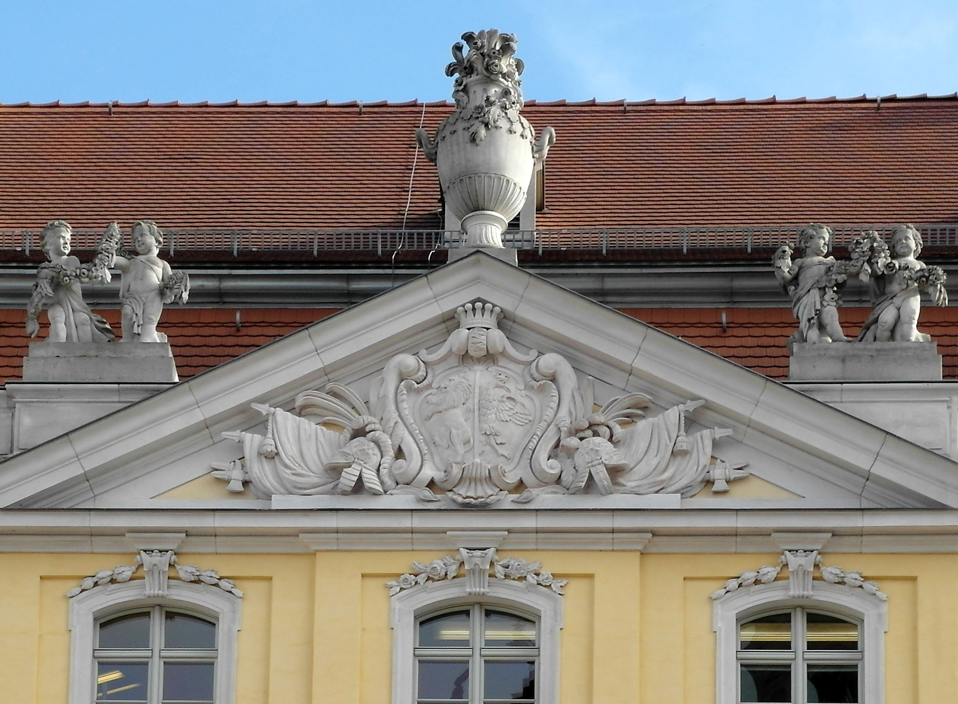 08.10.2012 01067 Dresden Neumarkt: Coselpalais, Westfassaden zum Ehrenhof mit dem Wappen des Grafen Cosel im Giebel. [SAM1497]20121008230DR.JPG(c)Blobelt